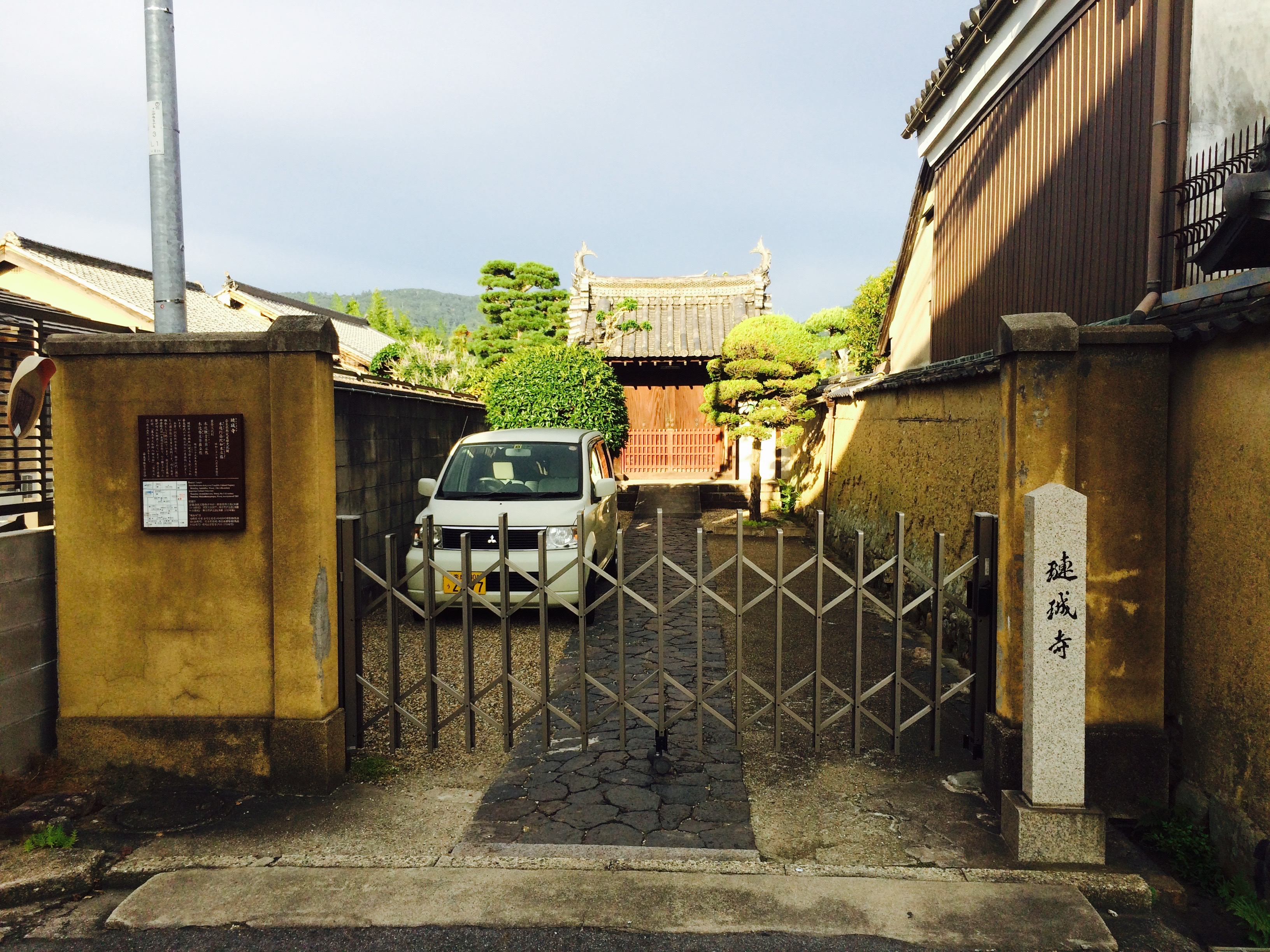 奈良市璉珹寺